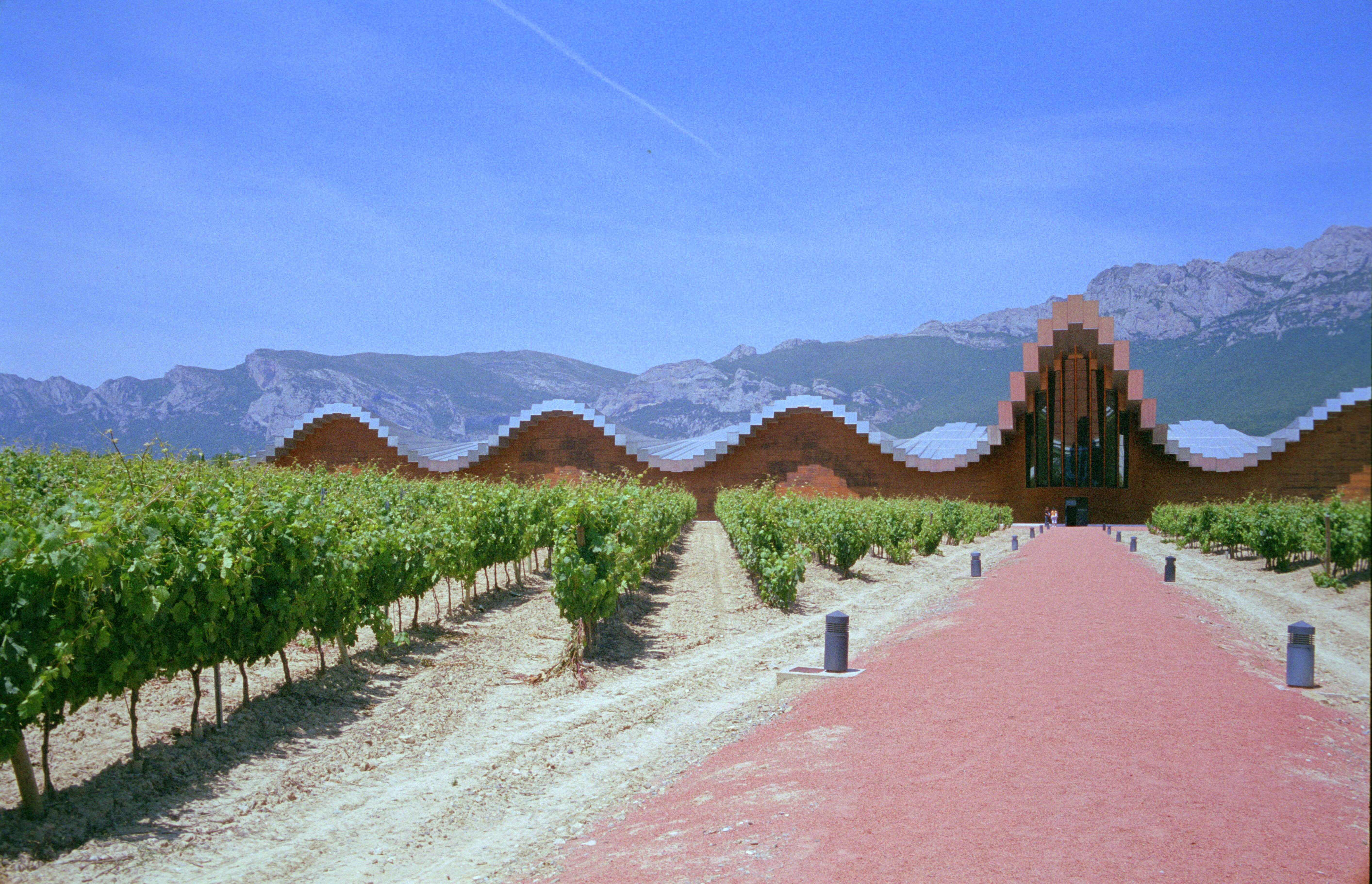 Bodegas Ysios LSI La Rioja